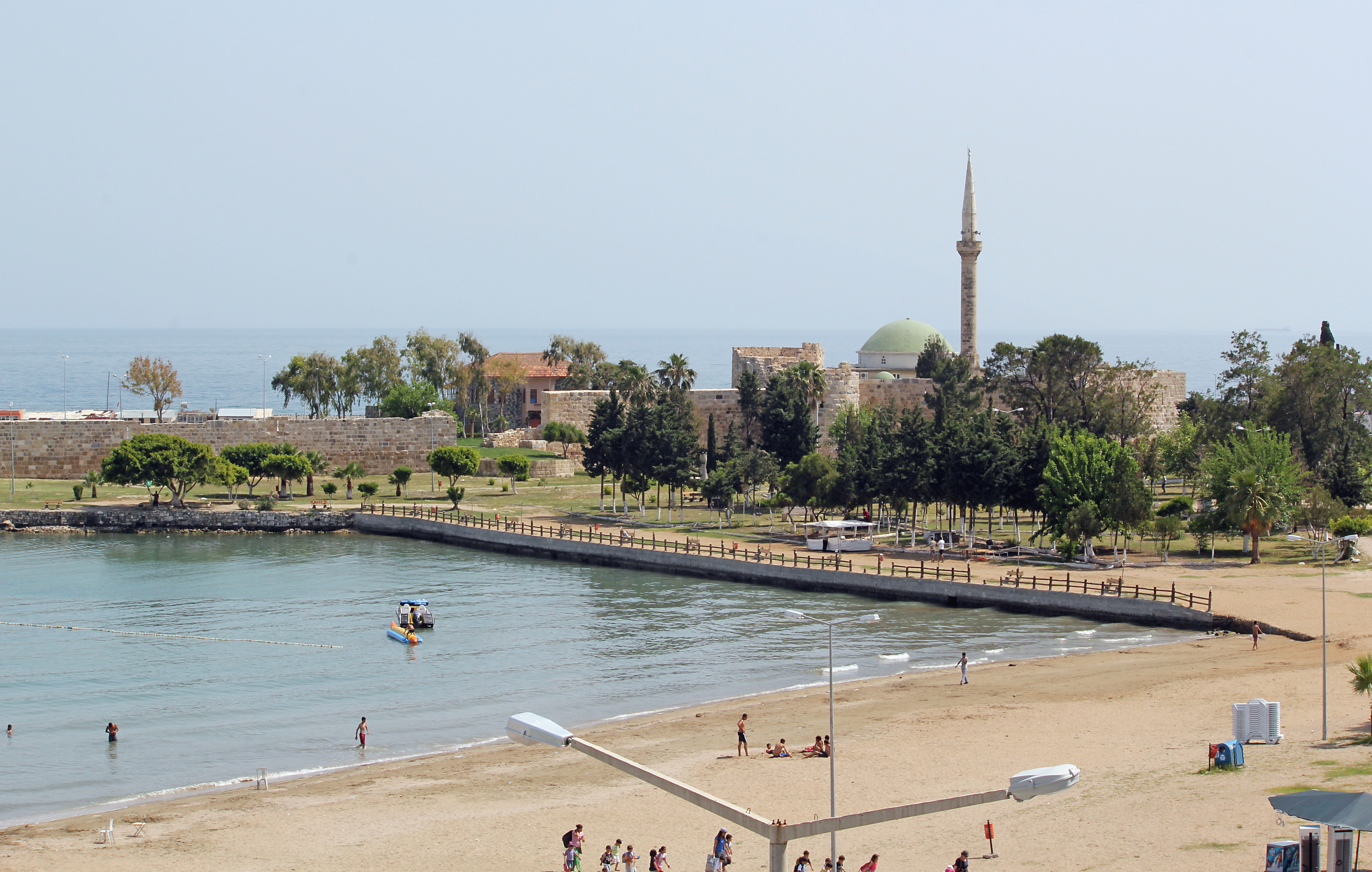 Yumurtalık, Kreisstadt in der Südtürkei, Landburg (Ayas Kalesi) mit Moschee